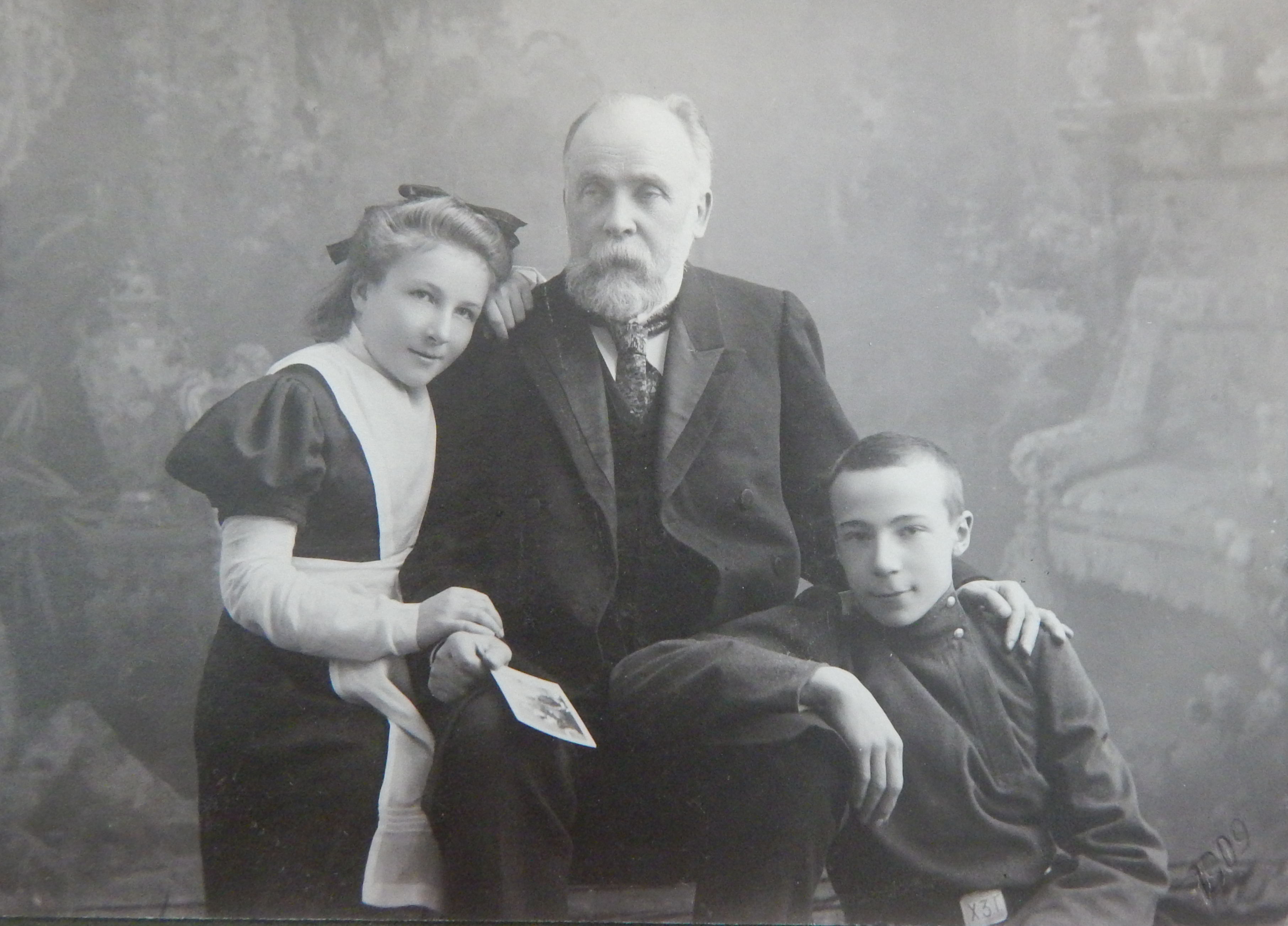 Орест Габель з молодшими дітьми Маргаритою та Юрієм. 1909 рік. Харків. Фотоательє «А. Скассі та Ко»